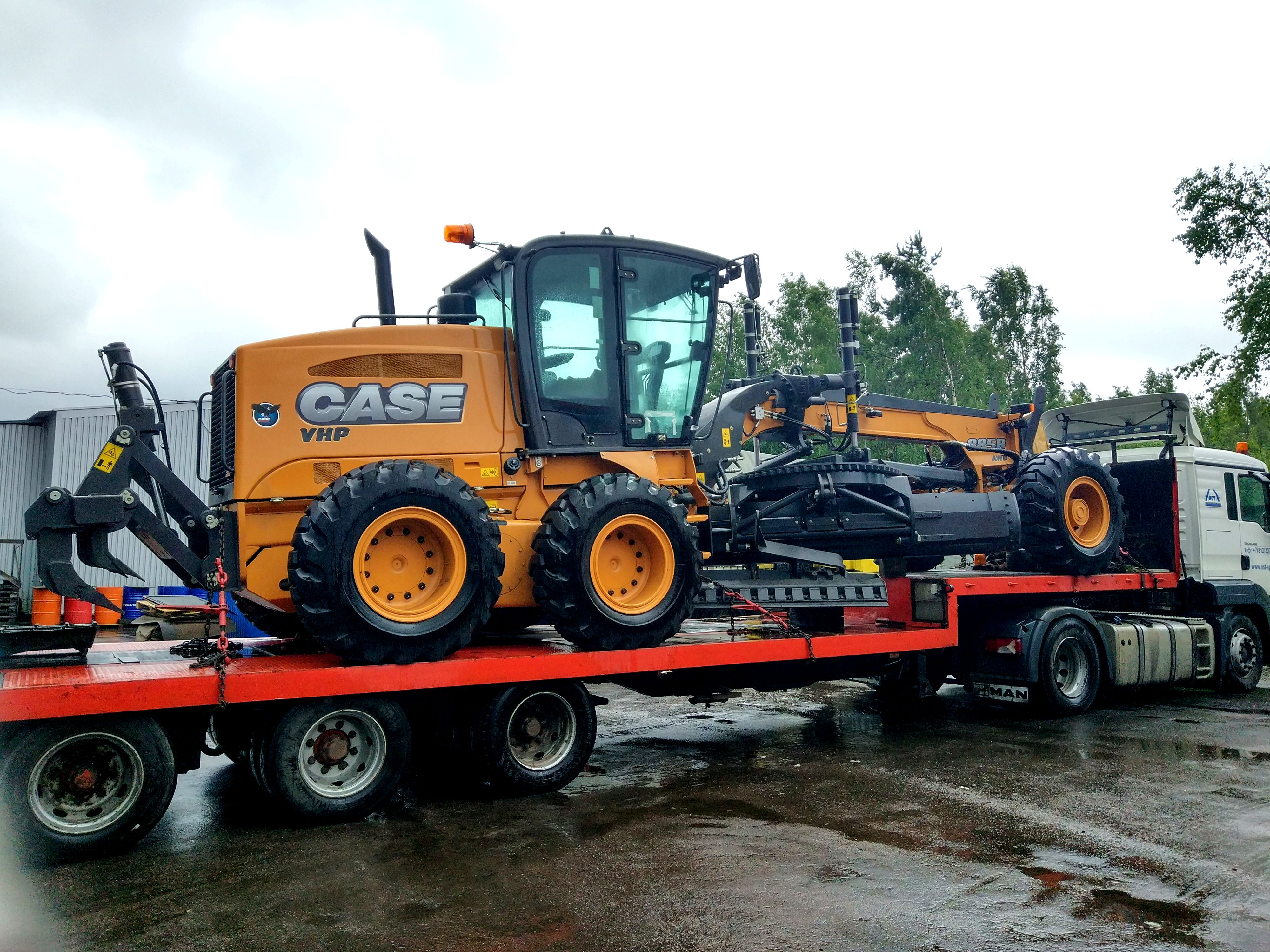 Грейдер CASE во время разгрузочных работ